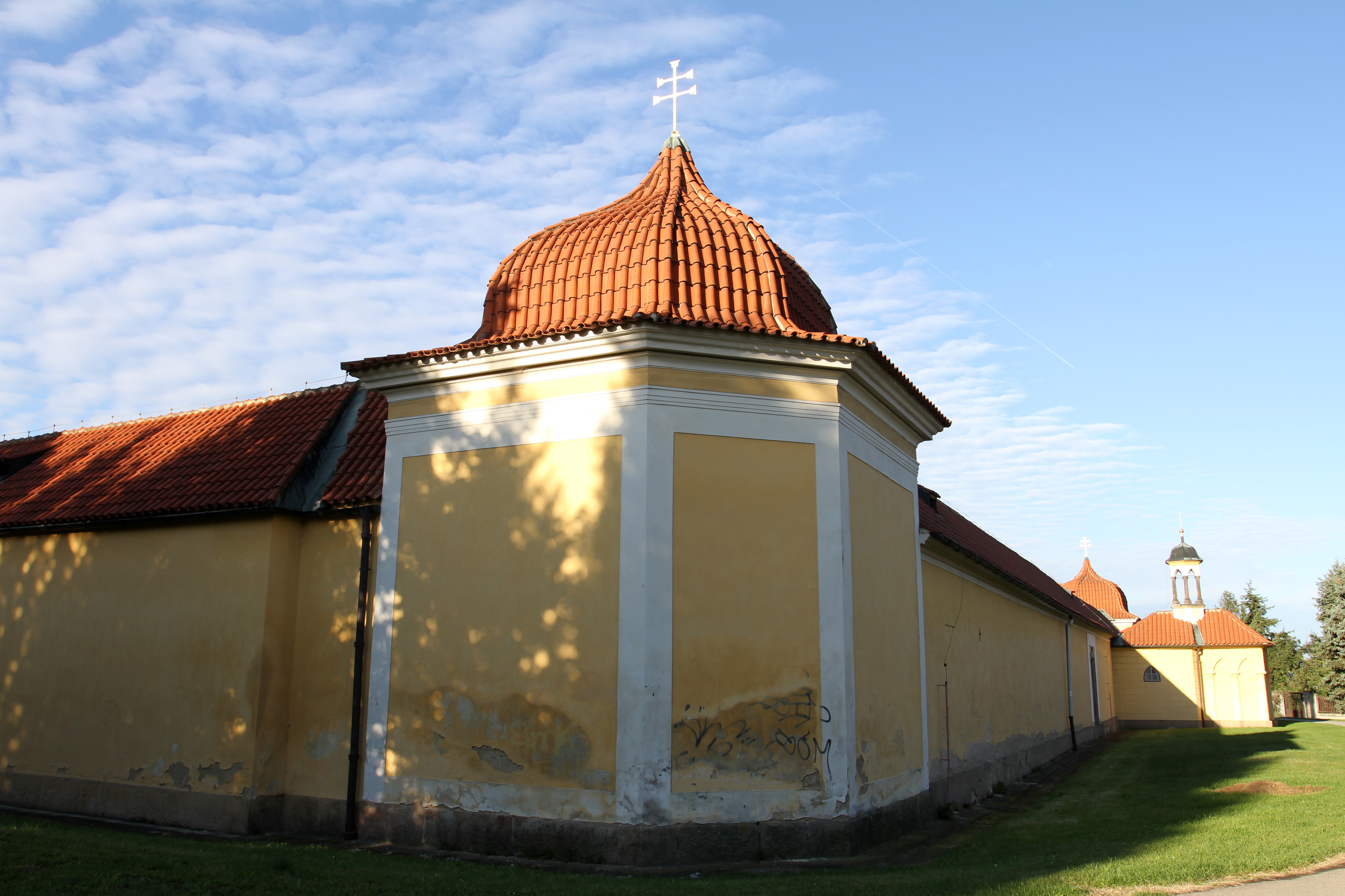 Kostel Panny Marie Vítězné (Řepy), Praha-Řepy, Karlovarská